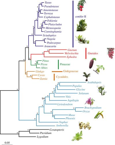 Figura 1. Relações evolutivas de plantas de semente inferidas a partir do alinhamento concatenado das posições de primeiro e segundo códons de 1308 ortogrupos usando o método de máxima verossimilhança particionada em RAxML, com cada gene tratado como uma partição. Os asteriscos mostram nós suportados por um valor de autoinicialização de 100%.